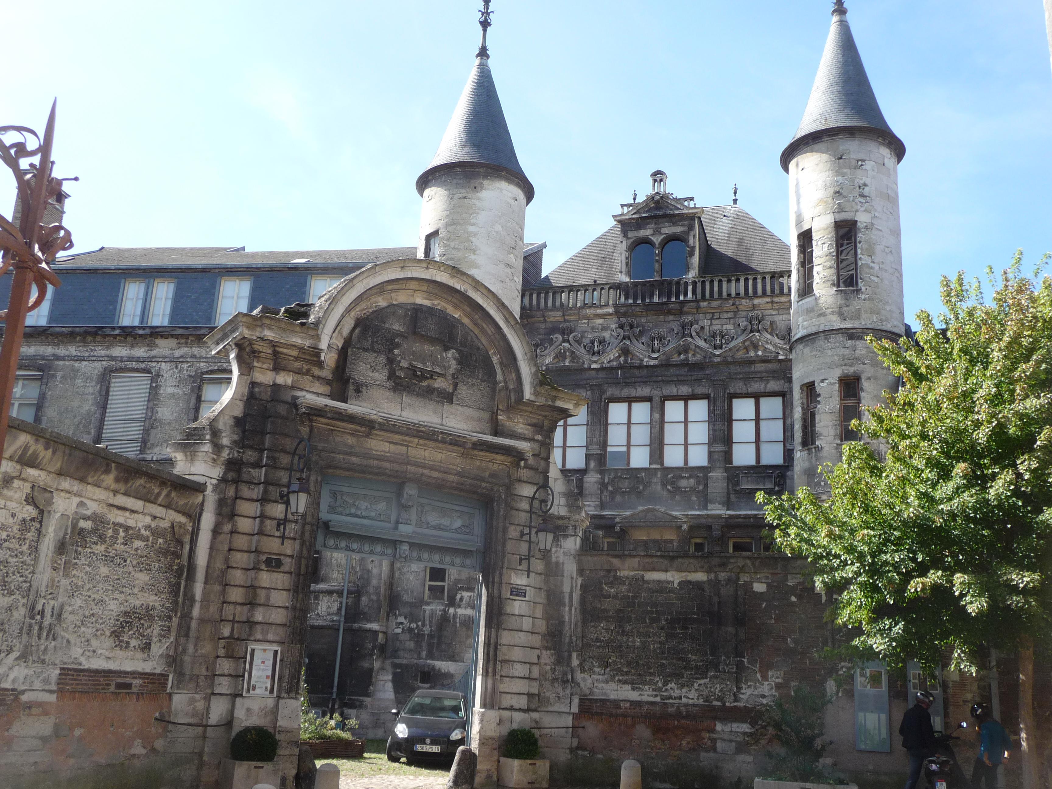 Cet hôtel du 16ème siècle,située rue du Vauluisant, face à l'église Saint-Pantaléon, abrite un musée de l'histoire de la ville et de la bonneterie. .